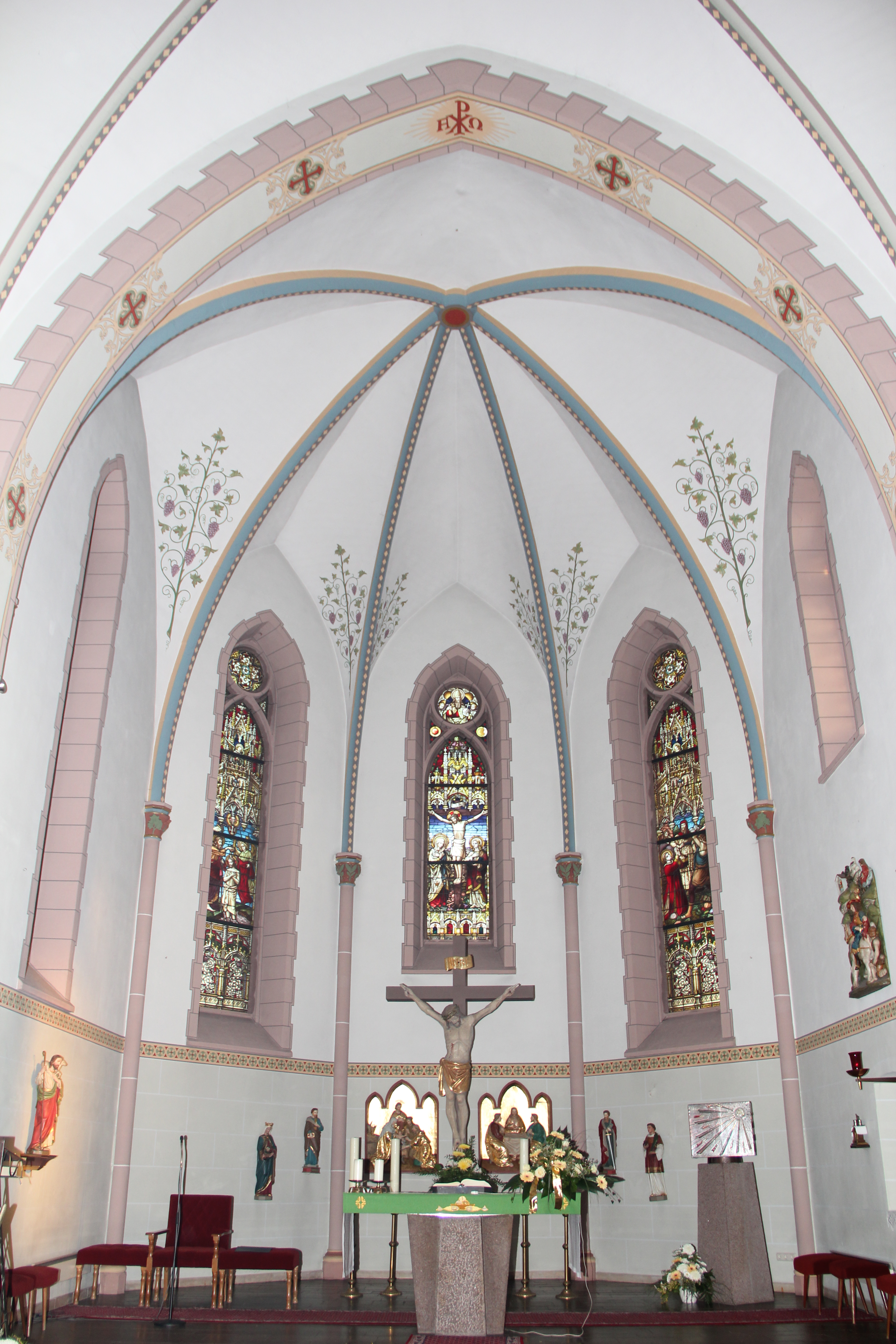 Chorraum der Sankt-Stephanus-Kirche in Berlingerode